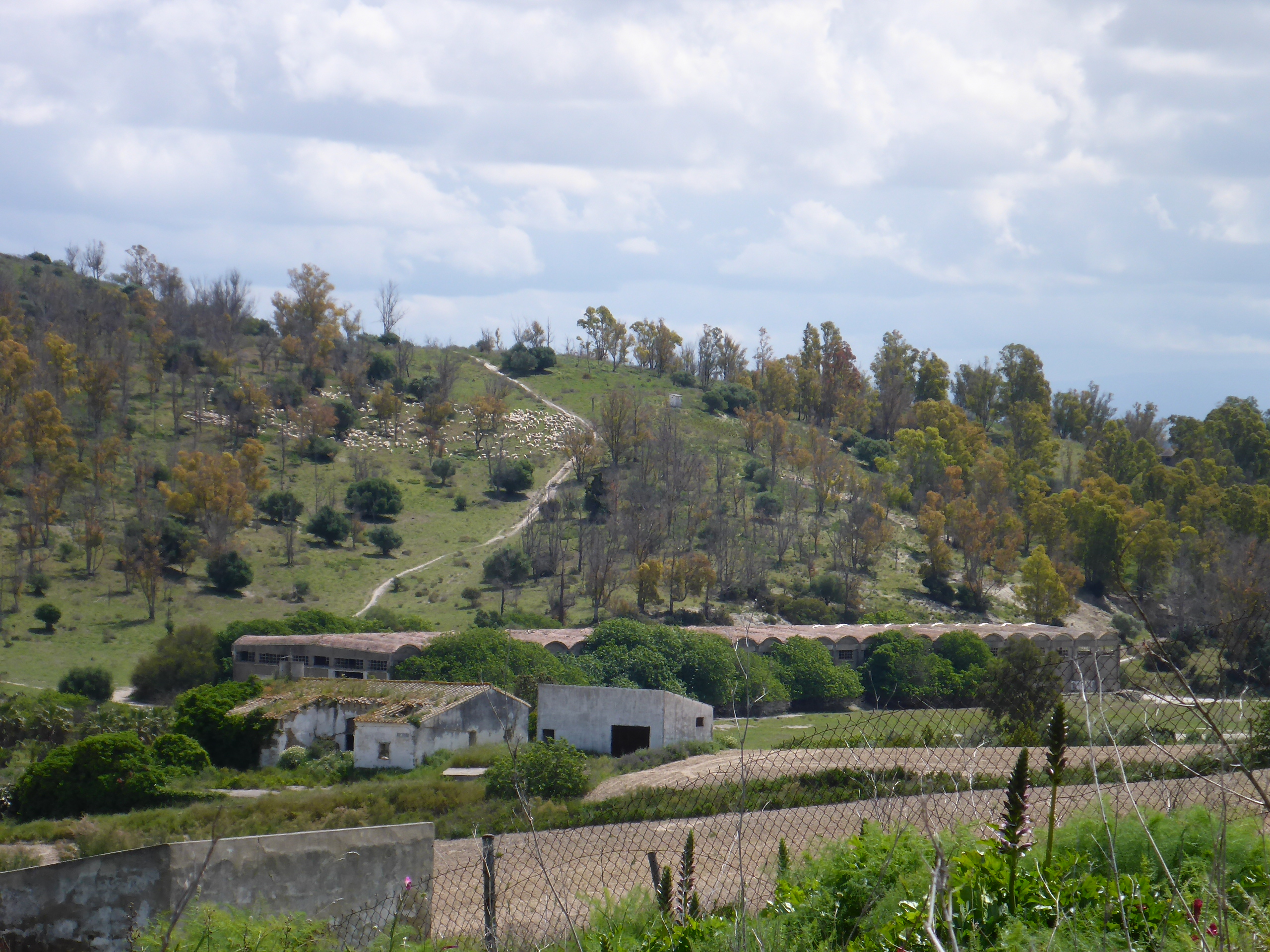 Rancho La Bola, Jerez de la Frontera (Andalucía, España)